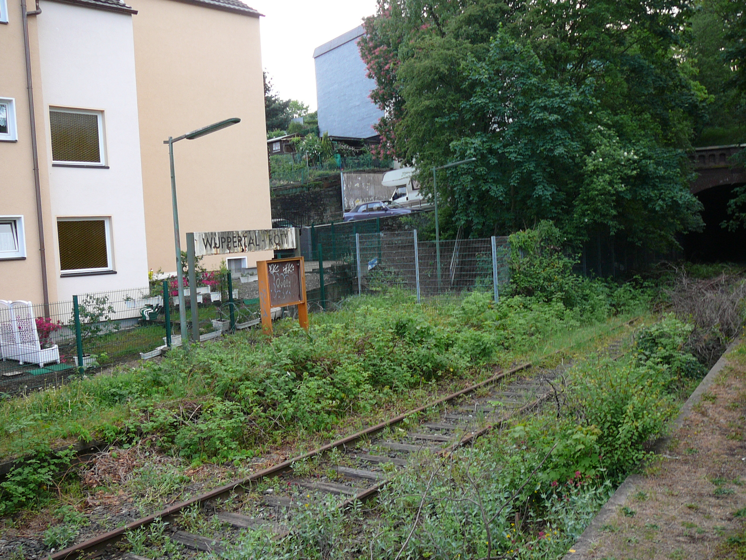 Historischer Haltepunkt Wuppertal-Rott